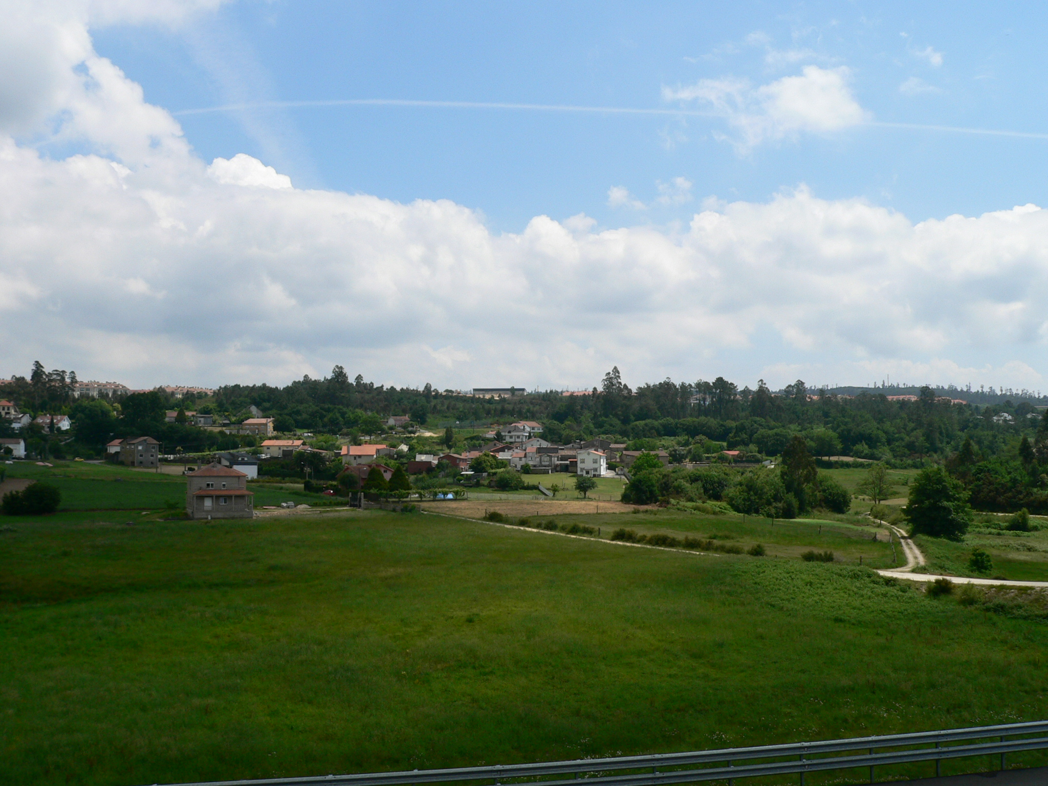 ventin